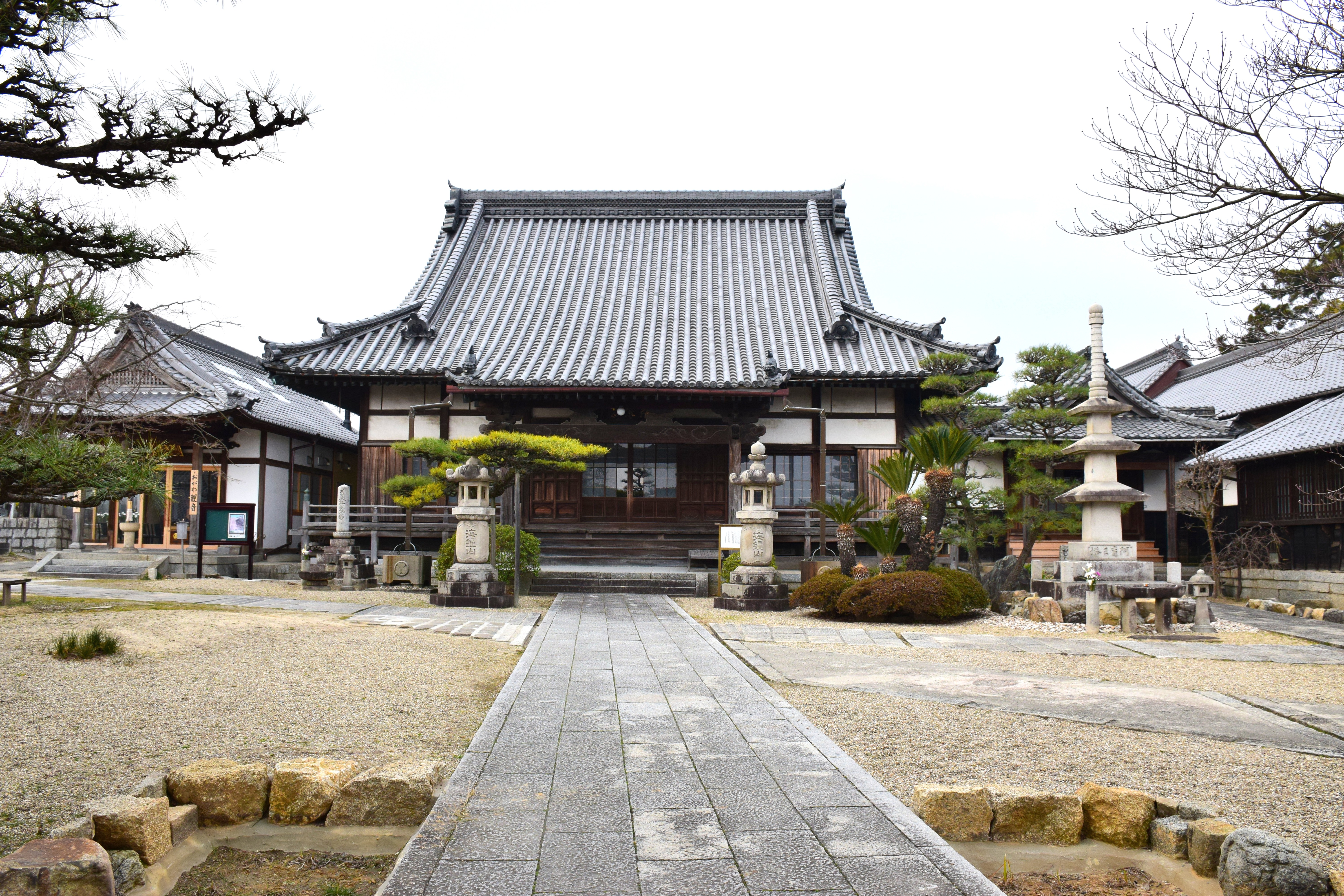 善導寺本堂